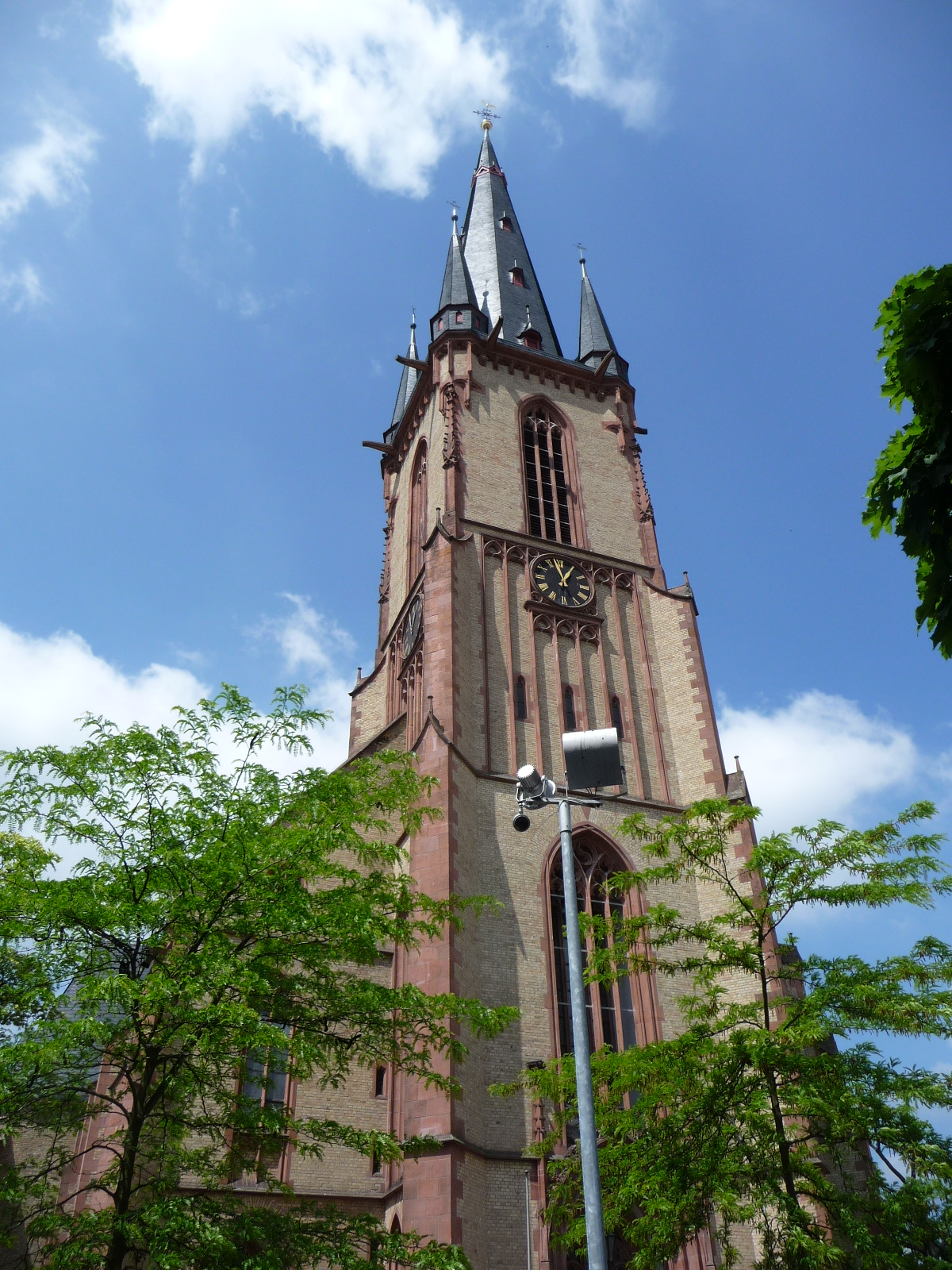 katholische Kirche St. Aposteln in Viernheim, im Kreis Bergstraße (Hessen)